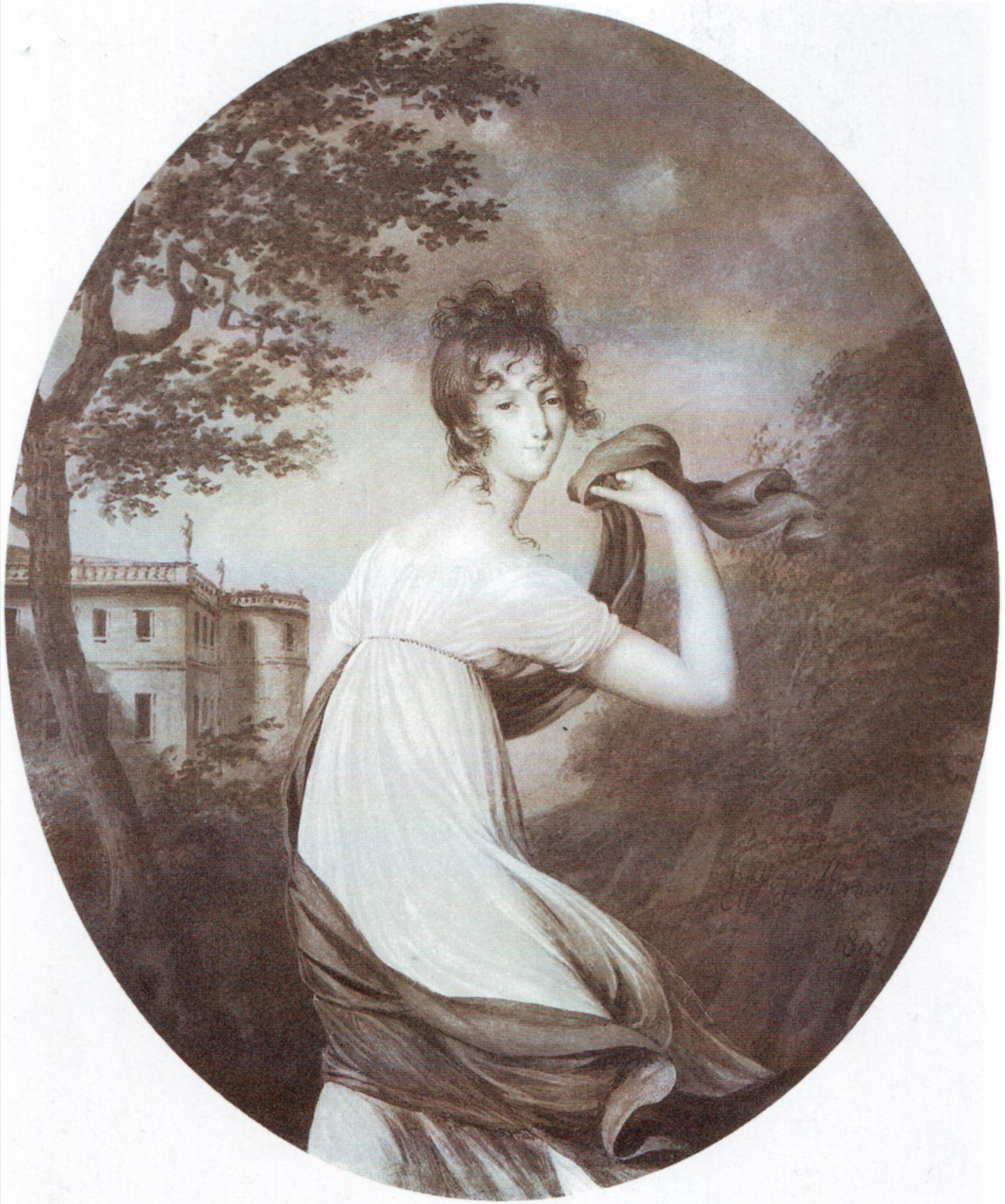 Принцесса Мария-Паулина-Луиза Бирон, в замужестве Гогенцоллерн-Гехингенская. Princesse Marie-Pauline-Louise de Hohenzollern-Hechingen, née Biron Pauline von Sagan Princess Pauline, Duchess of Sagan